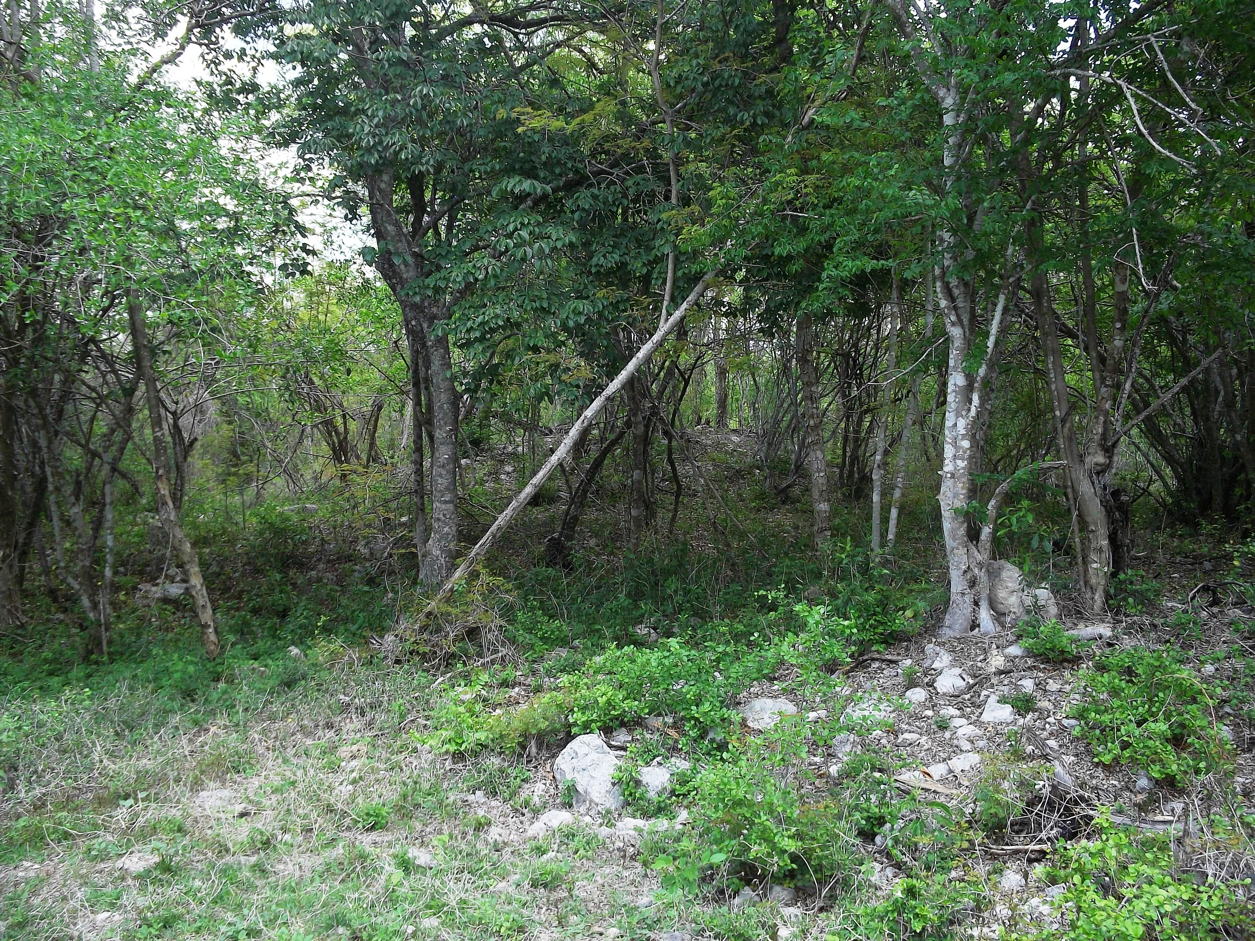 Sitio arquelógico de Kintunich, Yucatán.